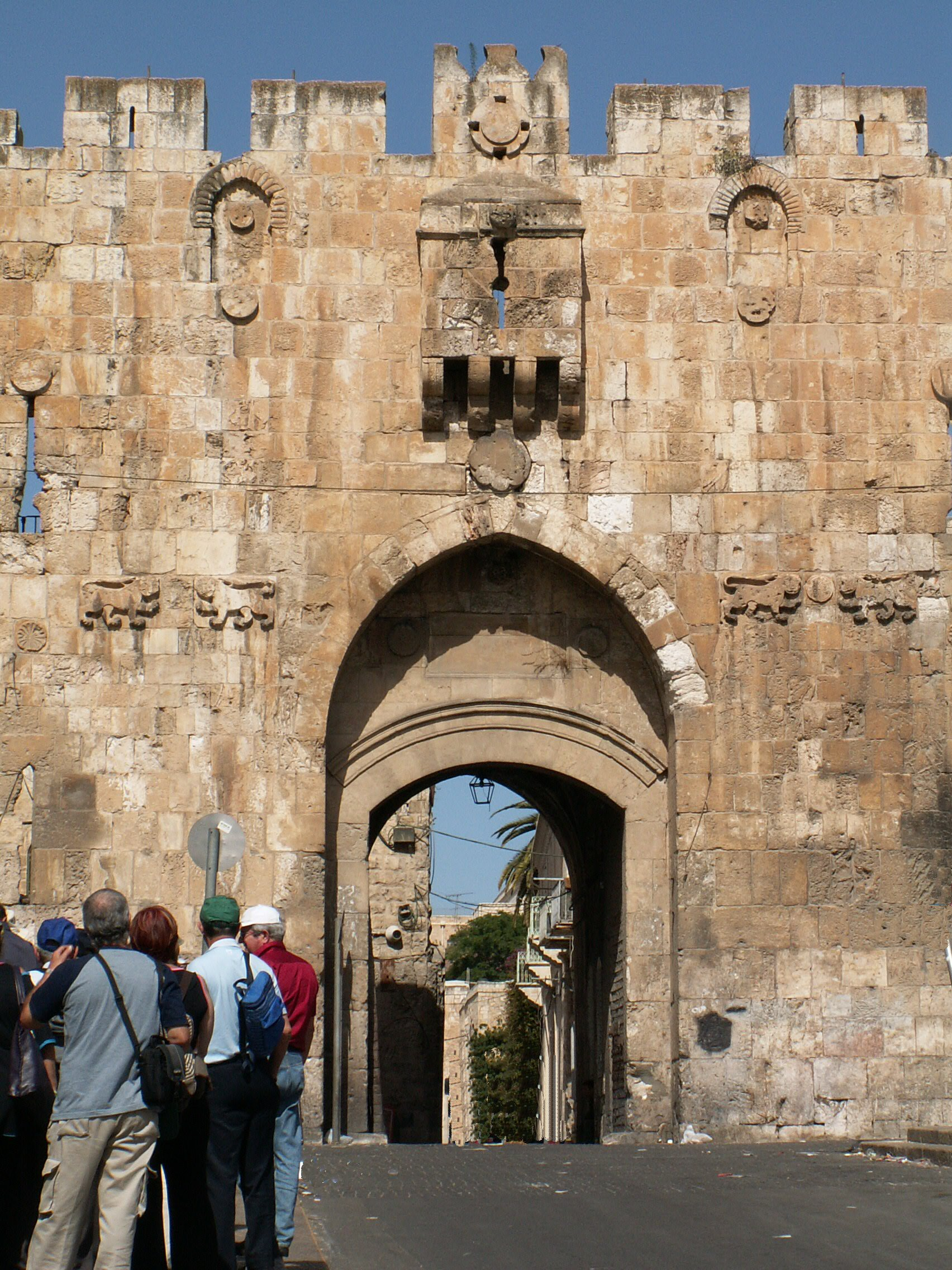 Jerusalem, lions gate